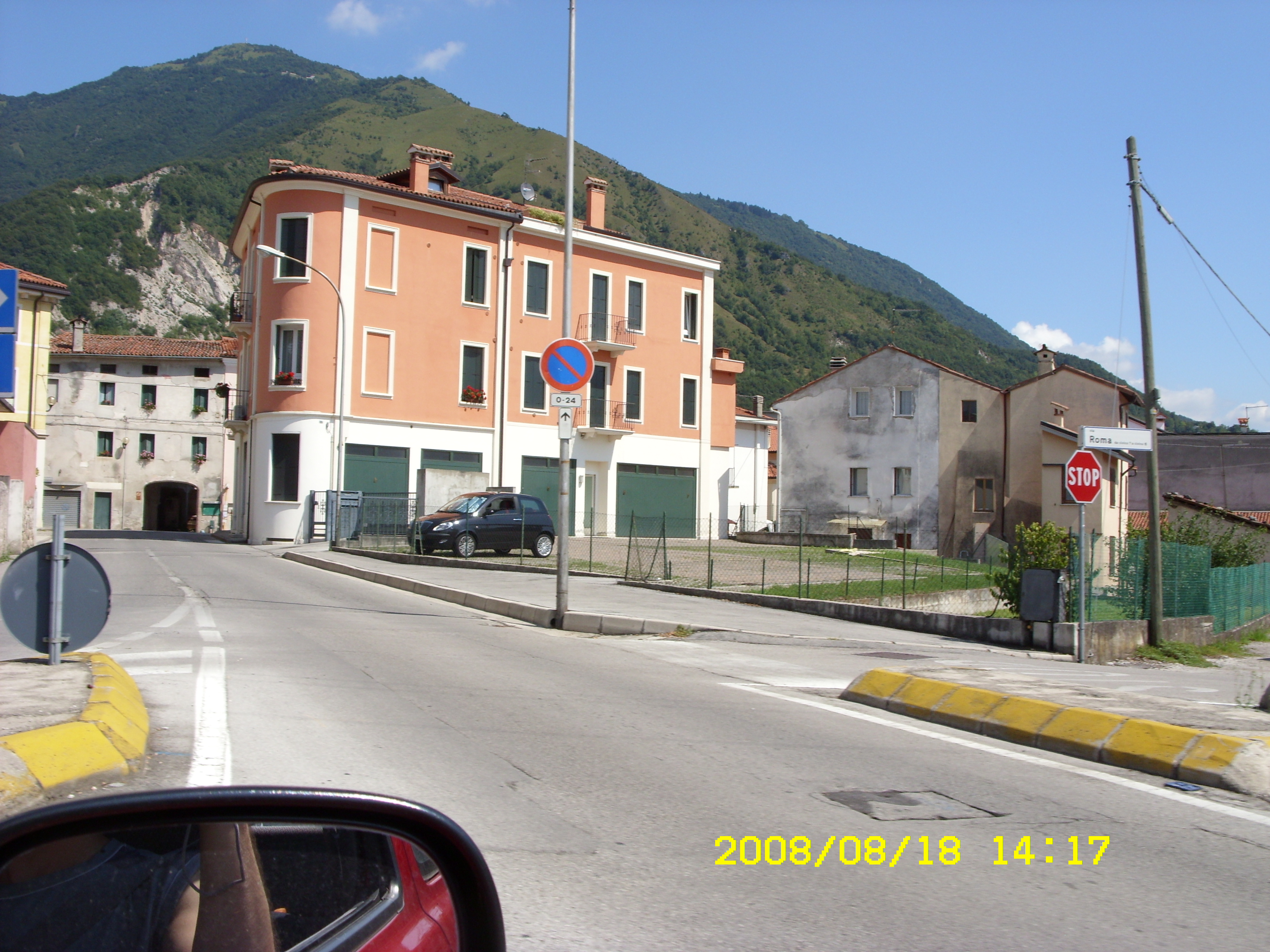 36014 Santorso VI, Italy